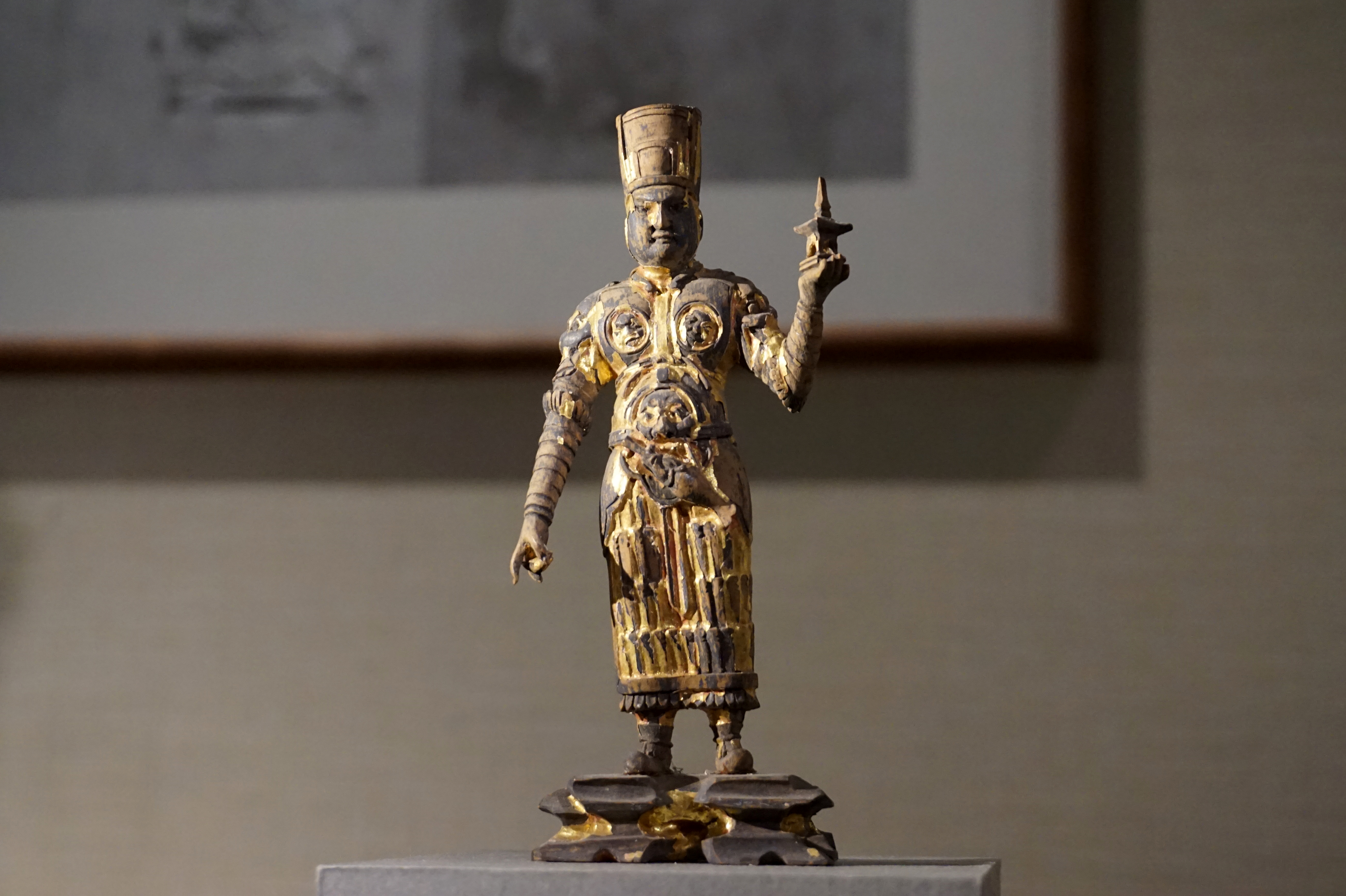 北宋金漆木雕毗沙门天王像。温州瑞安慧光塔出土，浙江省博物馆藏。